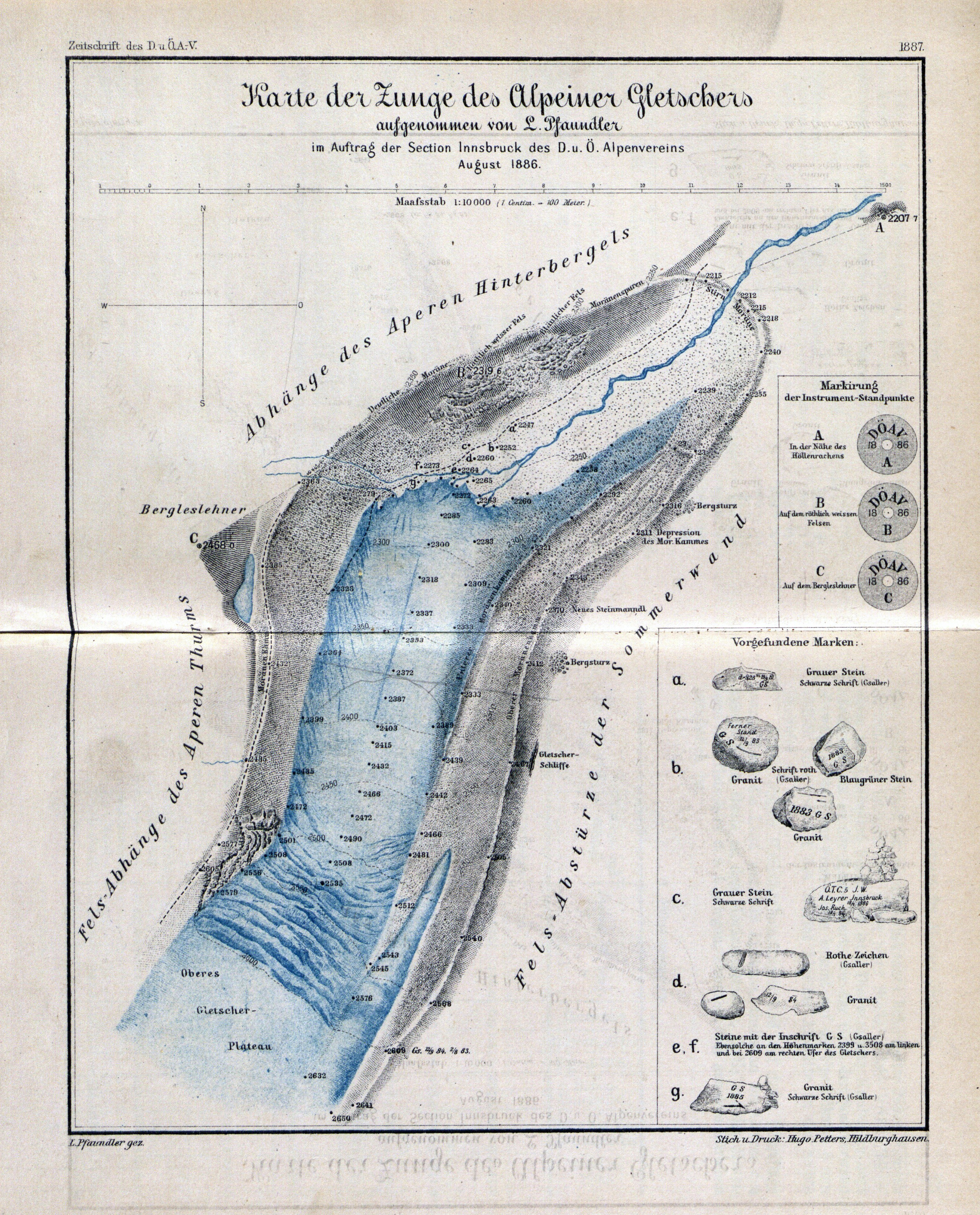 Karte der Zunge des Alpeiner Gletschers aus Zeitschrift des Deutschen und Oesterreichischen Alpenvereins 1887 Band 18